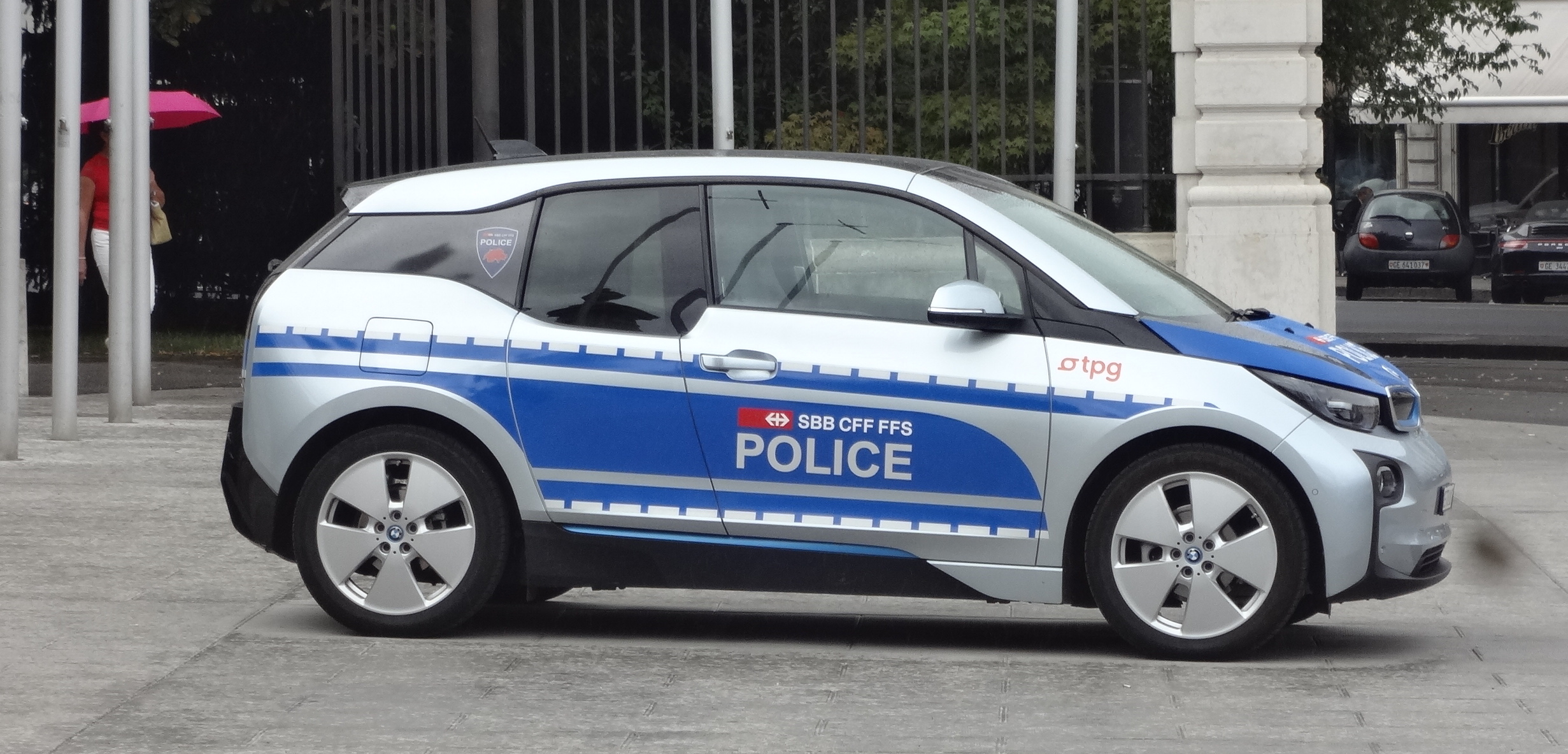 Véhicule de la Police des transports CFF, point d'appui de Genève. Porte aussi le logo des Transports publics genevois, stationné sur la Place Neuve, devant le Parc des Bastions.